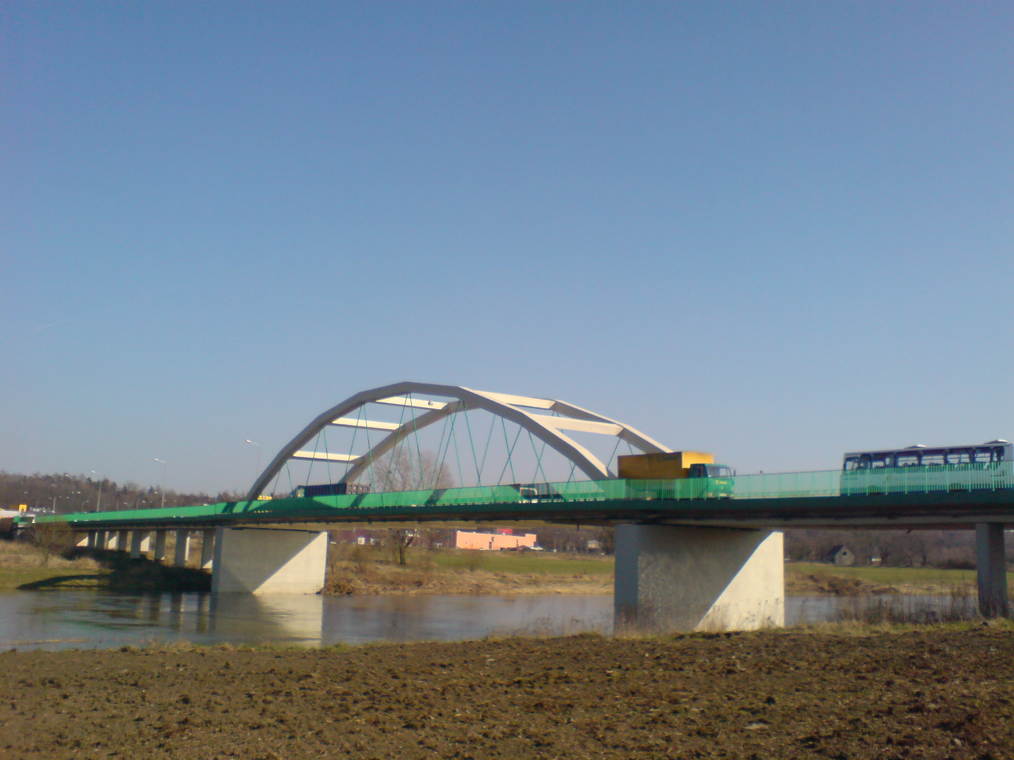 Most na kanale Ulga w Raciborzu–Oborze